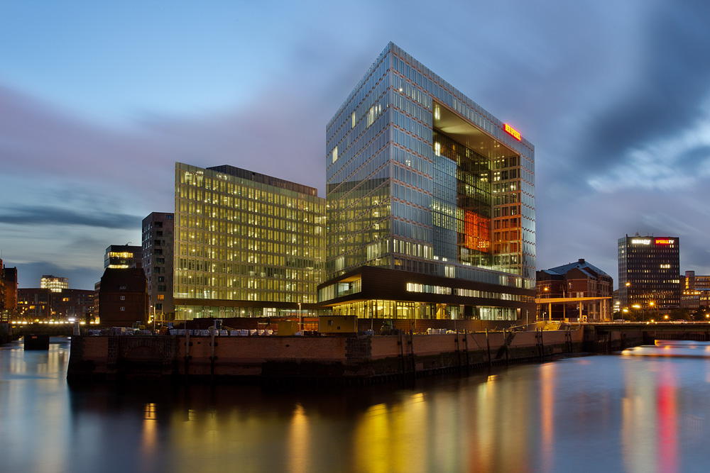 Das neue Spiegel Hauptgebäude in Hamburg. Von der Oberhafenbrücke aus gesehen.